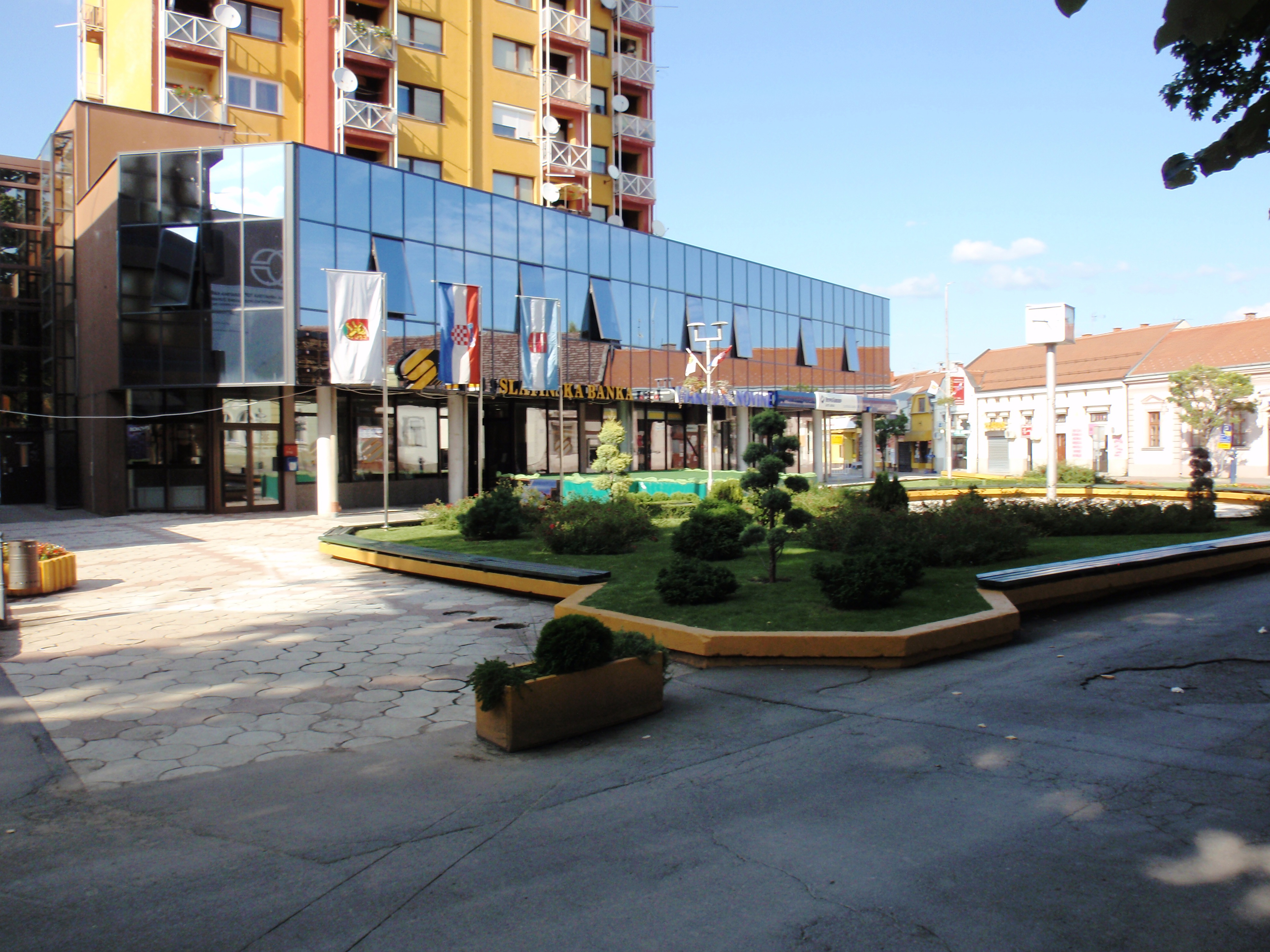 Virovitica